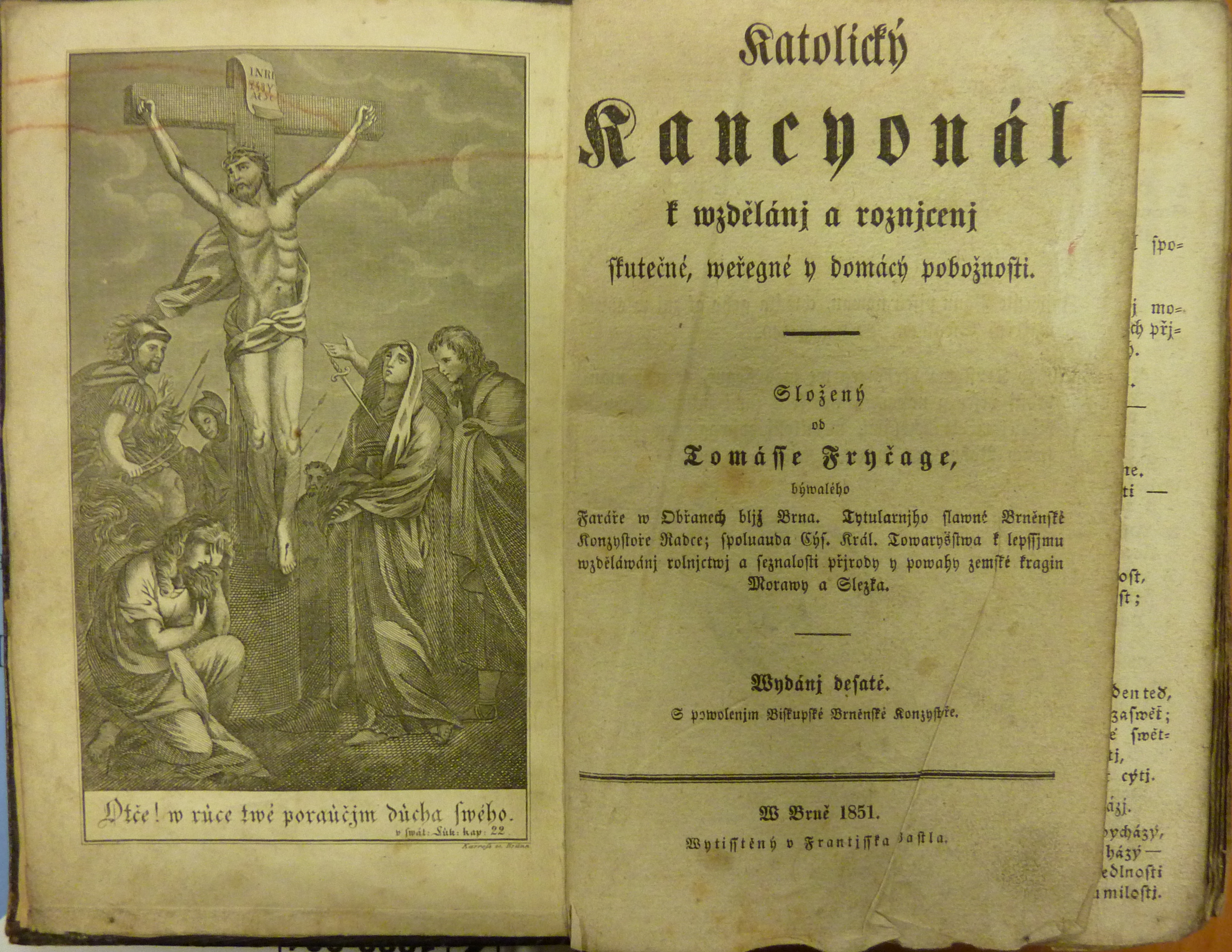 Titulní strana (Katolický kancionál k vzdělání a roznícení skutečné, veřejné i domácí pobožnosti. Složený od Tomáše Fryčaje, bývalého faráře v Obřanech blíž Brna. … Vydání desáté. V Brně 1851. Vytištěný u Františka Šastla.)